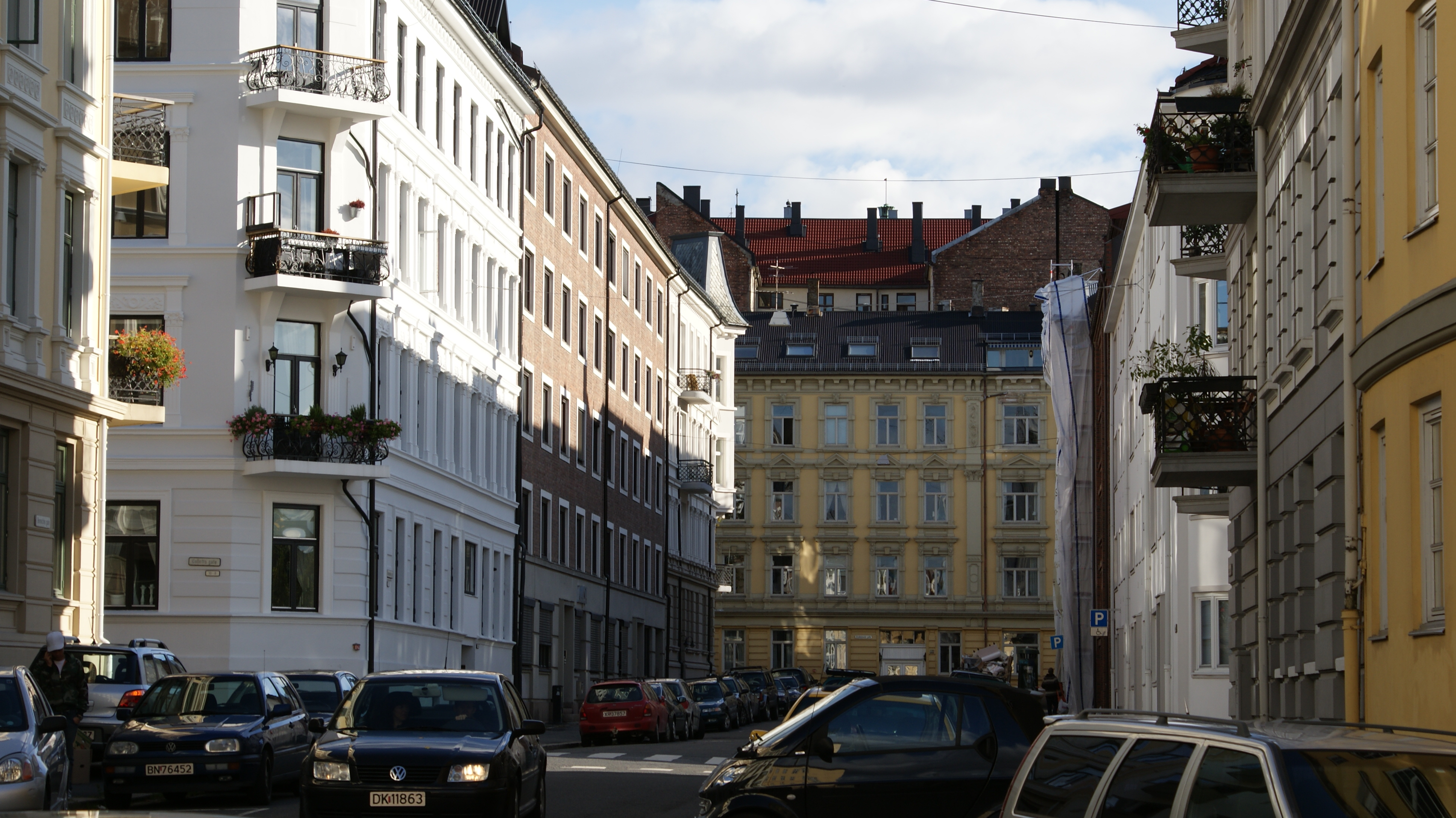 Benneches gate, Bislett, St. Hanshaugen, Oslo.